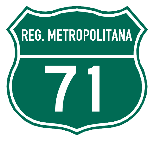 Escudo de la Ruta CH-71